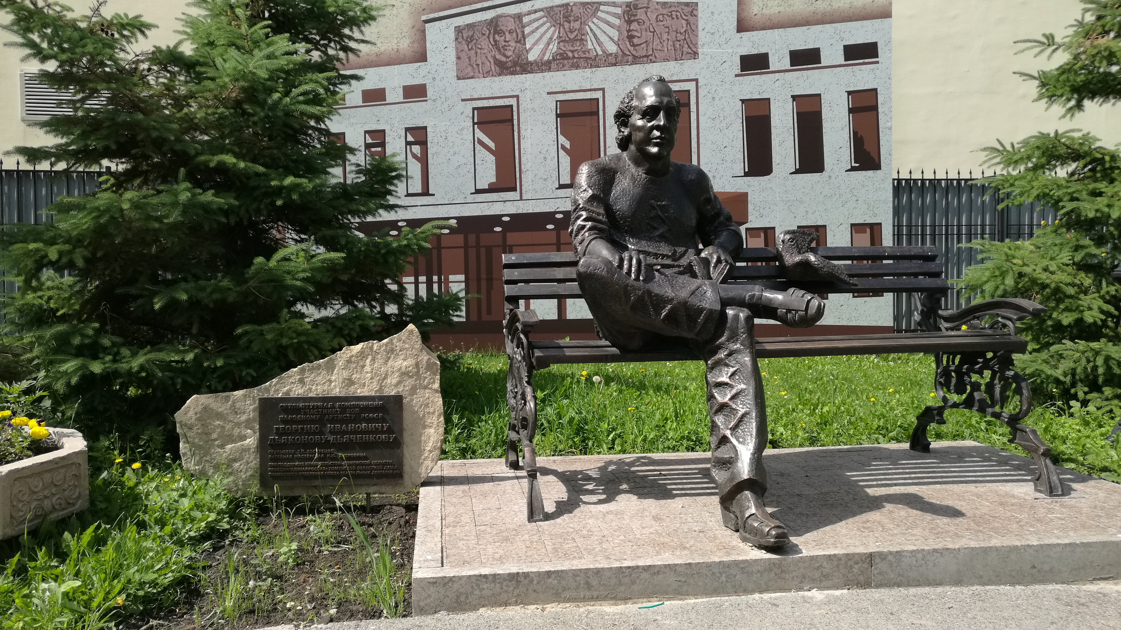 Skulptaĵo de la tjumena aktoro G. A. Djakonov-Djaĉenkov en la samnoma skvaro. Tjumeno, Rusio.